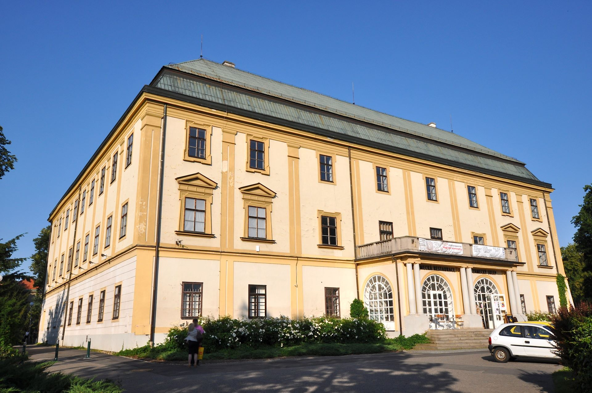 Zlin